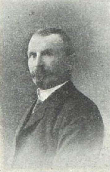 Stanislav Feltl (1858-?), rakouský a český politik